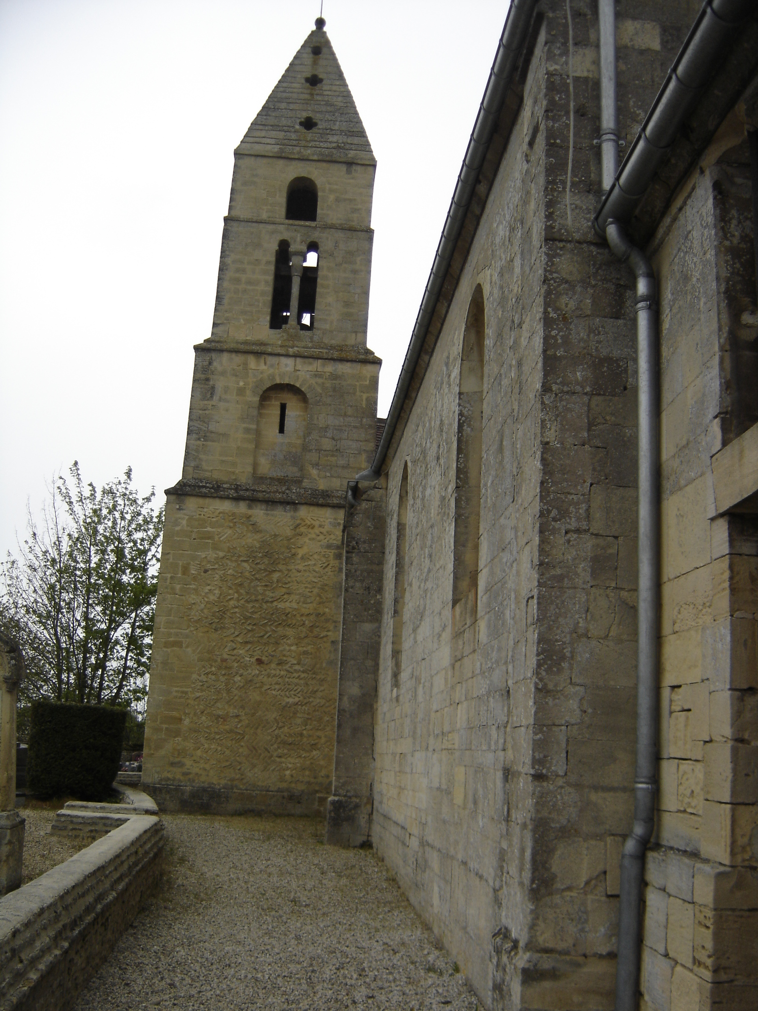 clocher original par sa construction à plusieurs étages , le dernier servait de poste de guet.